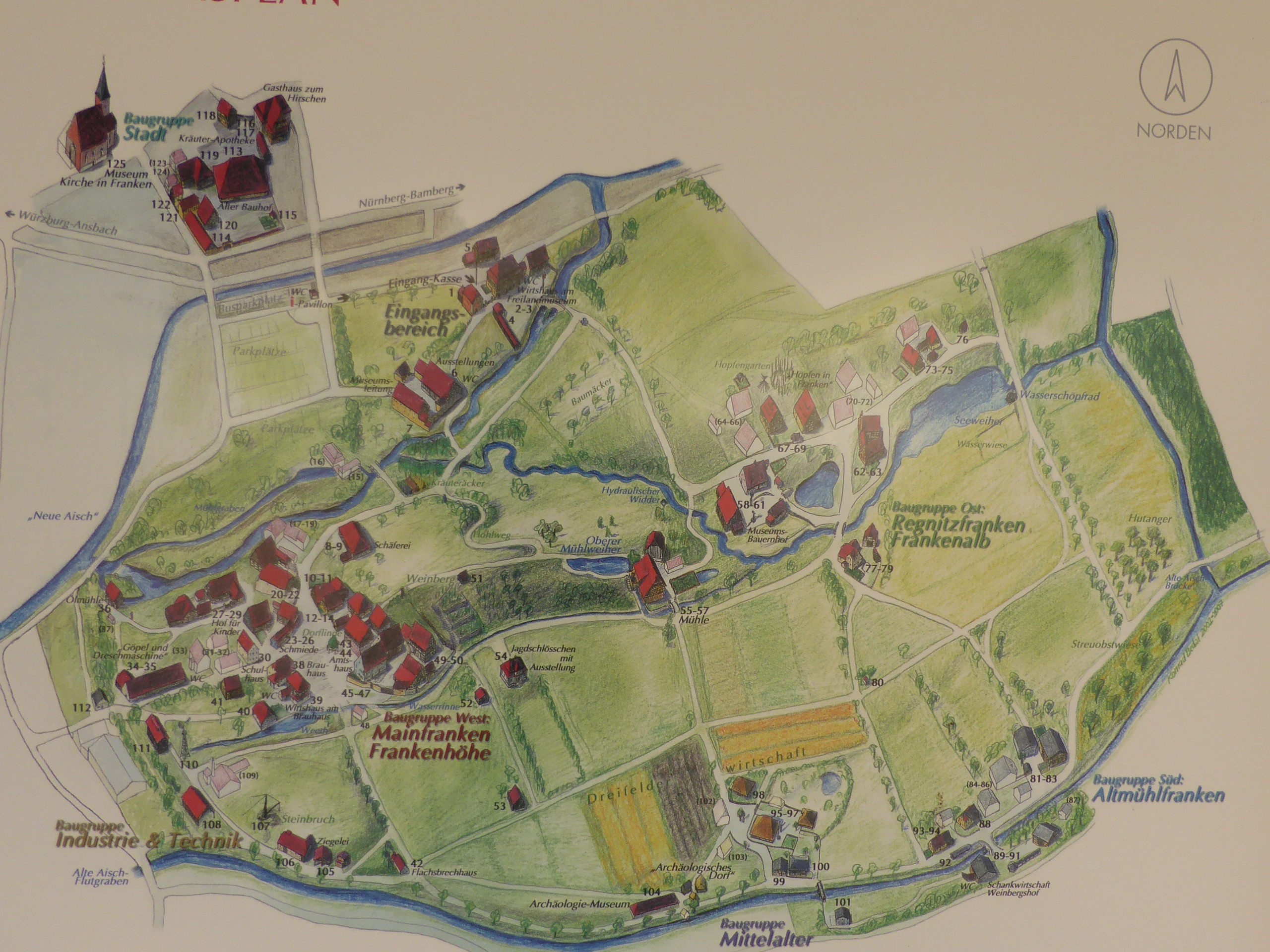 Übersichtsplan am Parkplatz des Freilandmuseums in Bad Windsheim.